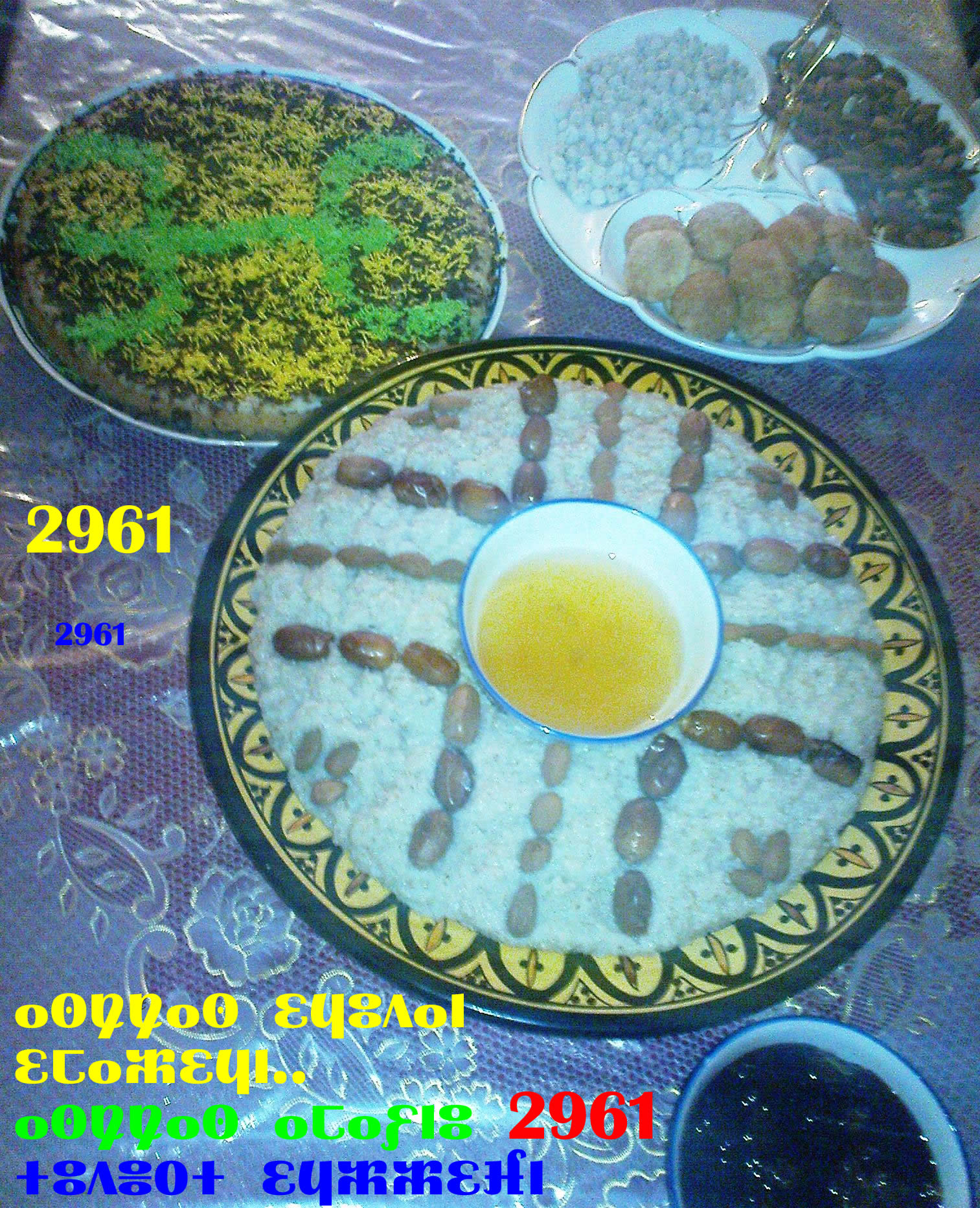 Tašlḥiyt/ⵜⴰⵛⵍⵃⵉⵜ: taglla d imsṭirn n iḍ n innayr niɣd iḍ n usggas amaziɣ.